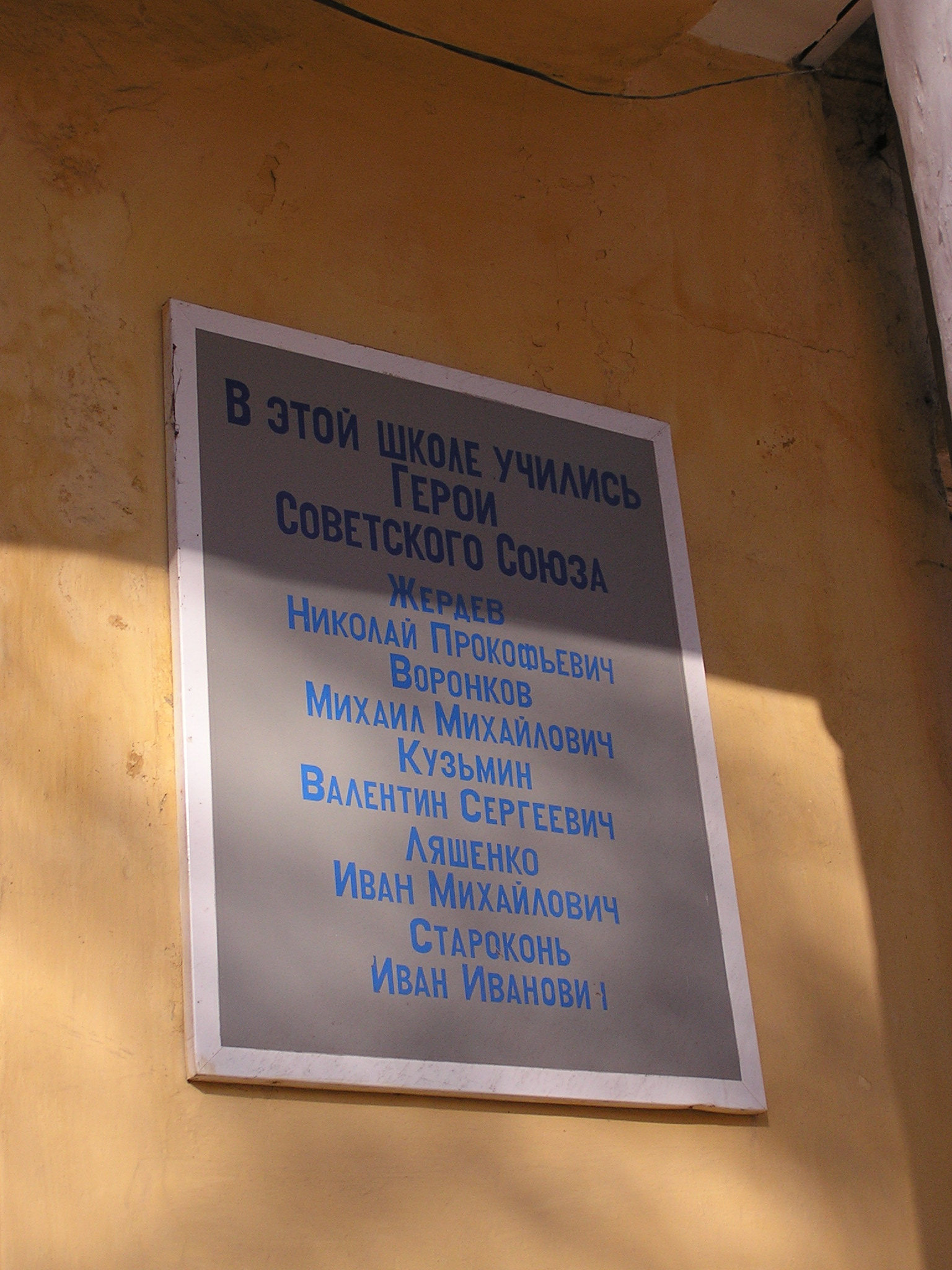 мемориальная табличка в Донецке